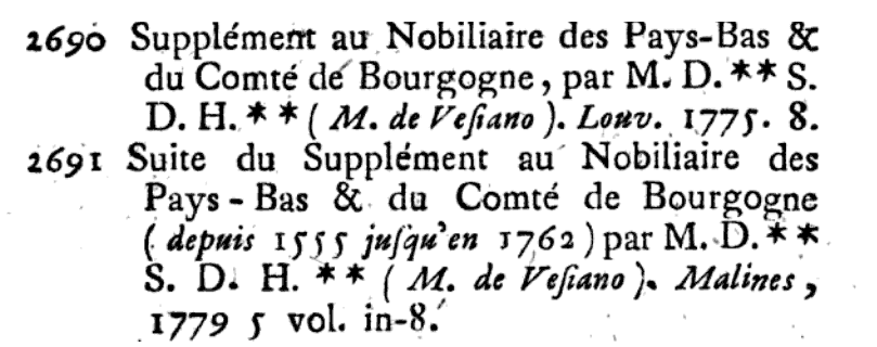 Page 301.